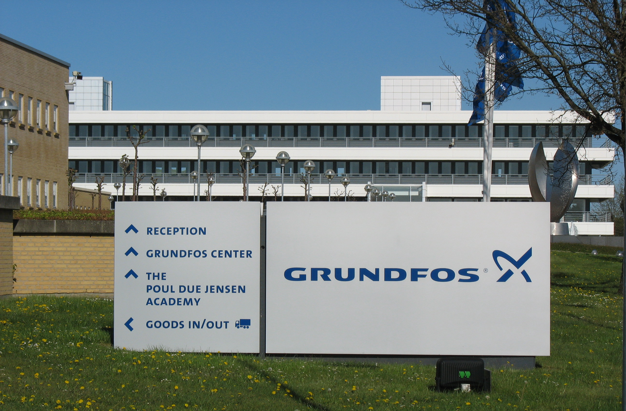 Grundfos' hovedsæde i Bjerringbro.